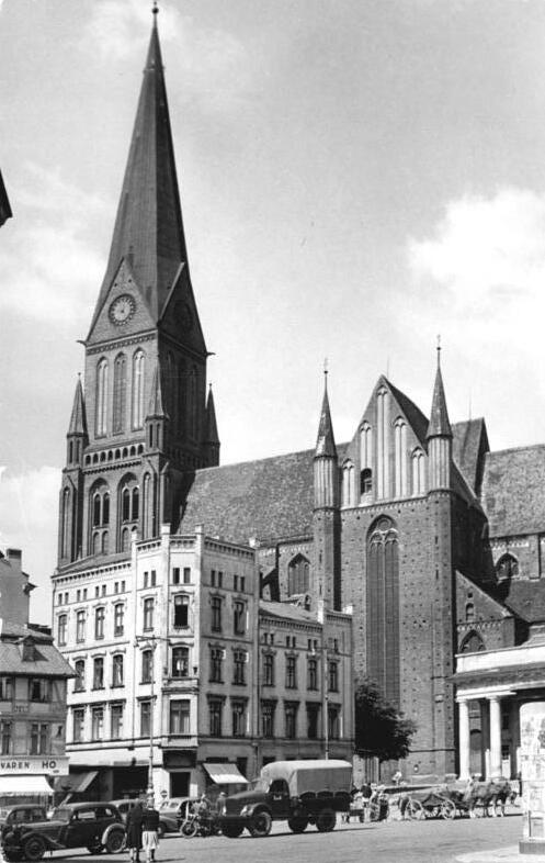 Schwerin, Dom Zentralbild Hoefer 28.4.1959 Schwerin: Der Dom.